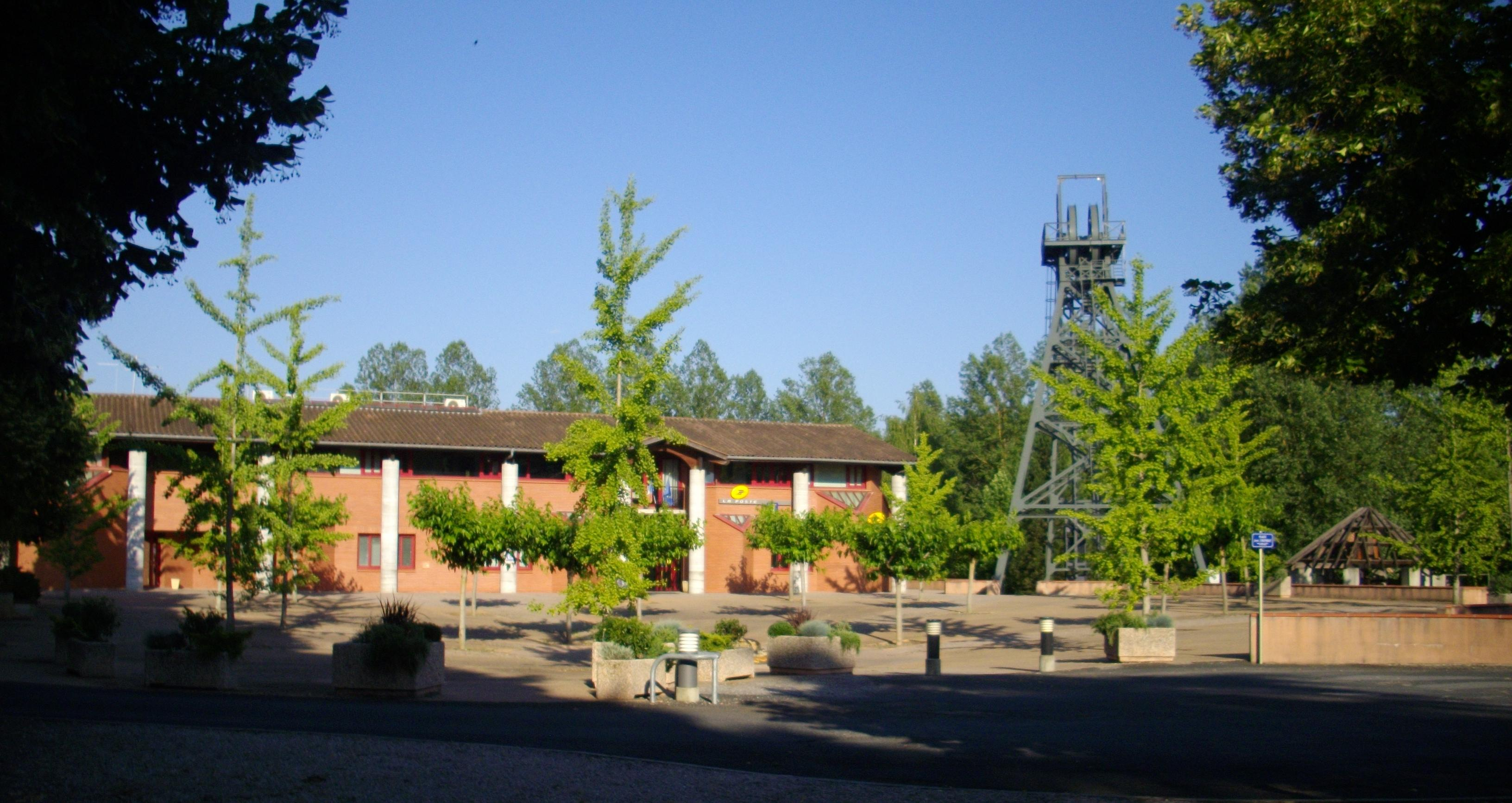 Mairie et poste de Blaye-les-Mines (à Pont-de-Blaye), avec le chevalement de l'ancien puits de mine de charbon de Sainte-Marie.